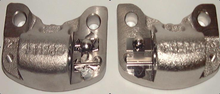 photos electroless nickel